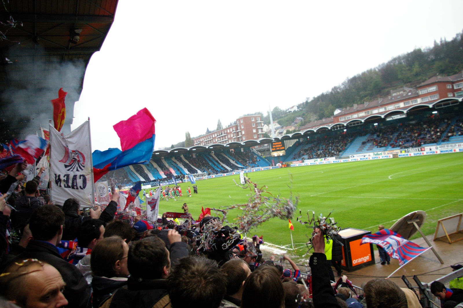 derby de la Normandie entre le Havre AC et SM Caen, avril 2009